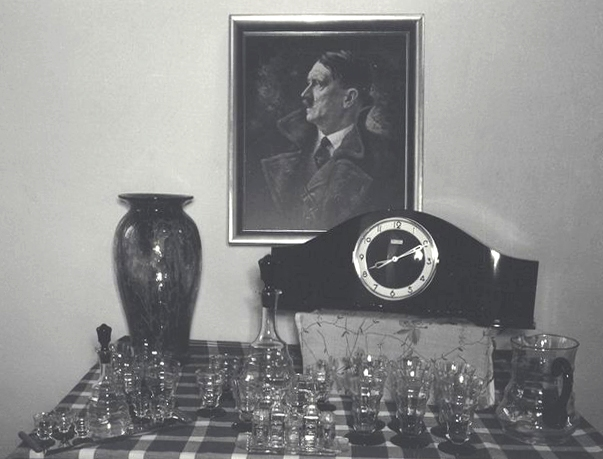 Österreich, Konzentrationslager Mauthausen, vermutlich Inneres einer KZ-Baracke mit Porträt Adolf Hitler, Uhr und Gläsern